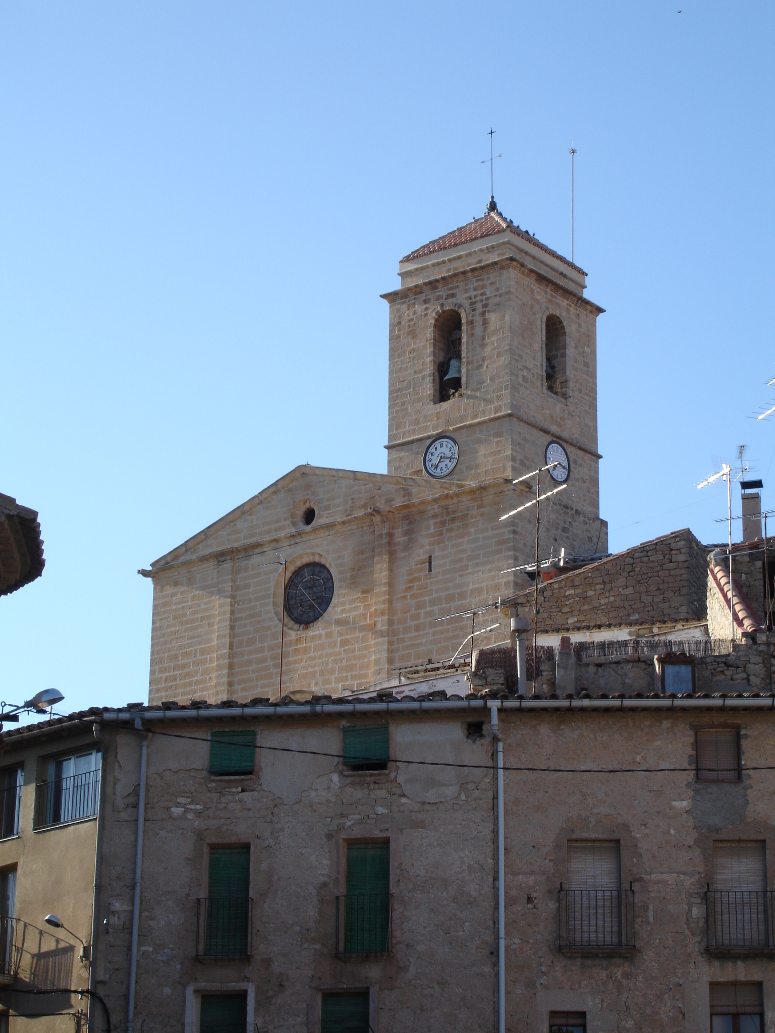 Iglesia de San Miguel, en Els Omellons (Lérida, España)